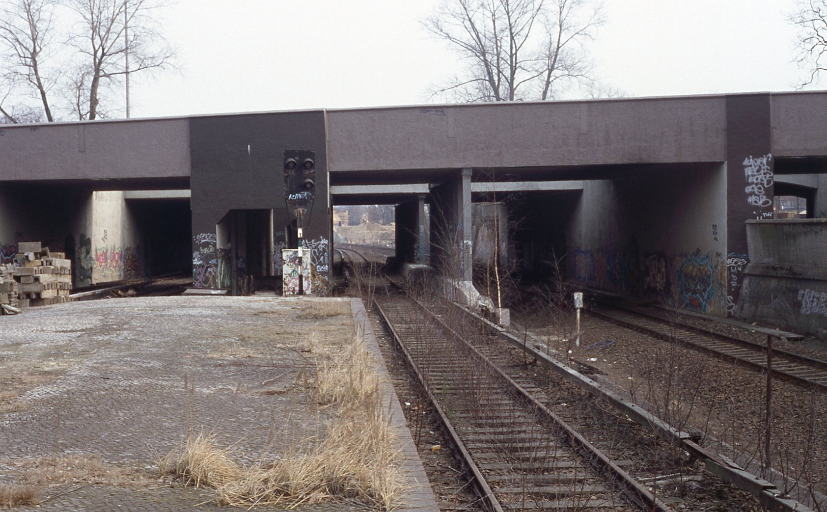 Messedammbrücke am S-Bahnhof Eichkamp in Berlin Westend